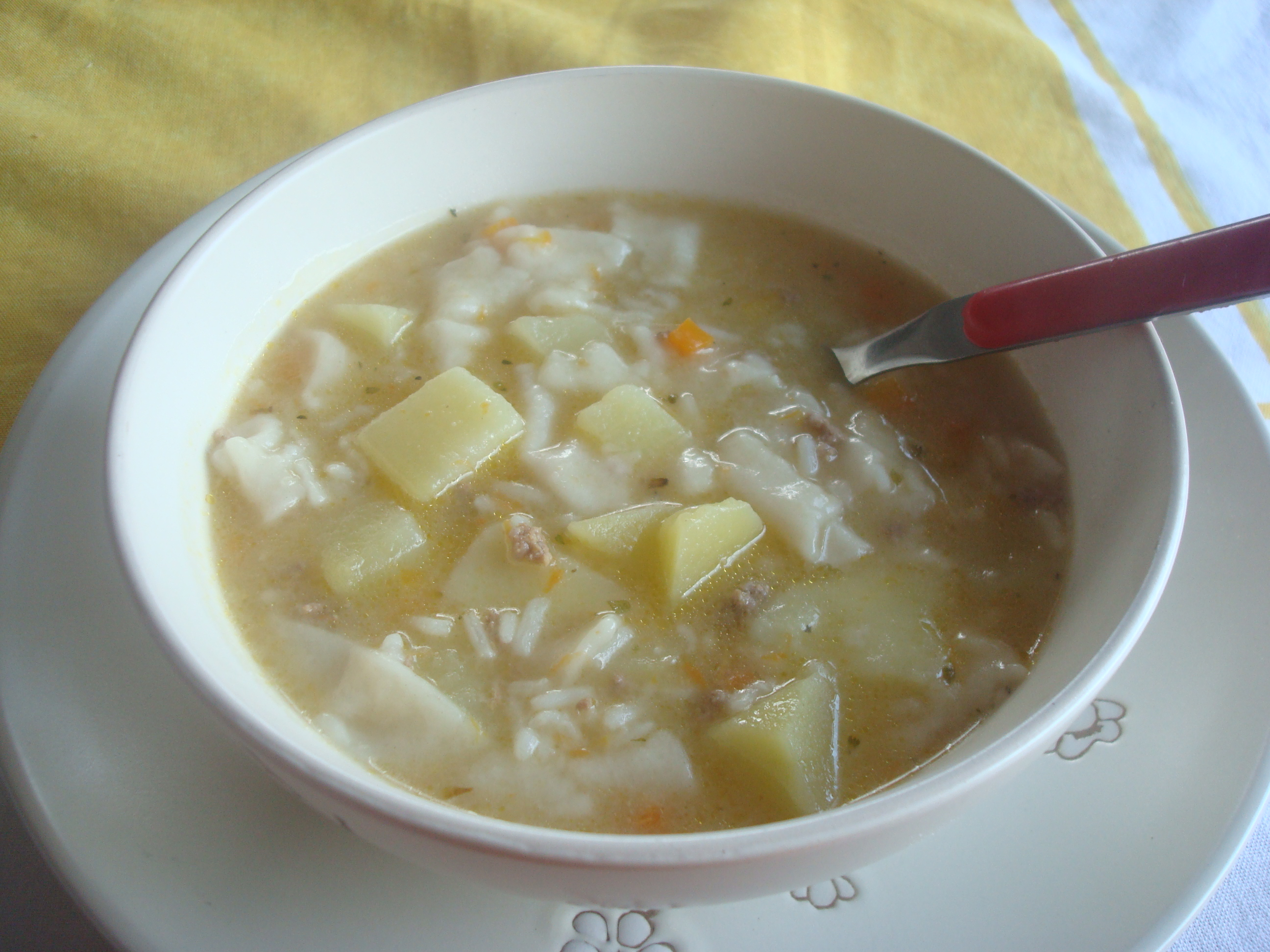 Pantrucas